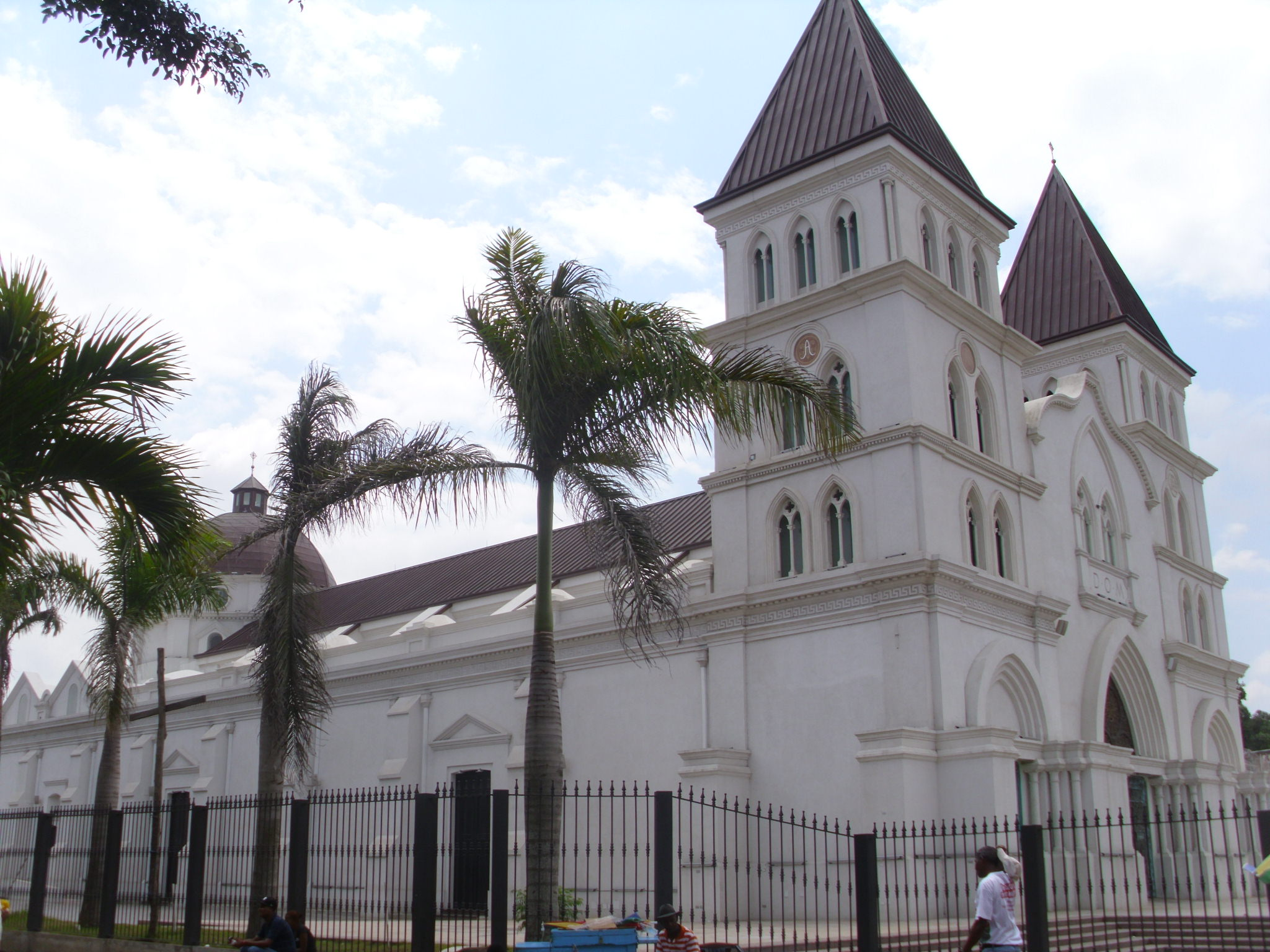 Kathedraal Santiago Apóstol in Santiago - Dominicaanse Republiek - 2014